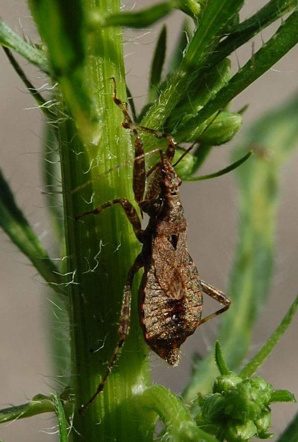 Himacerus apterus, Weibchen, Berlin Wedding 08. Juli 2007, taken by Rainer Altenkamp (User Accipiter), Berlin, own work